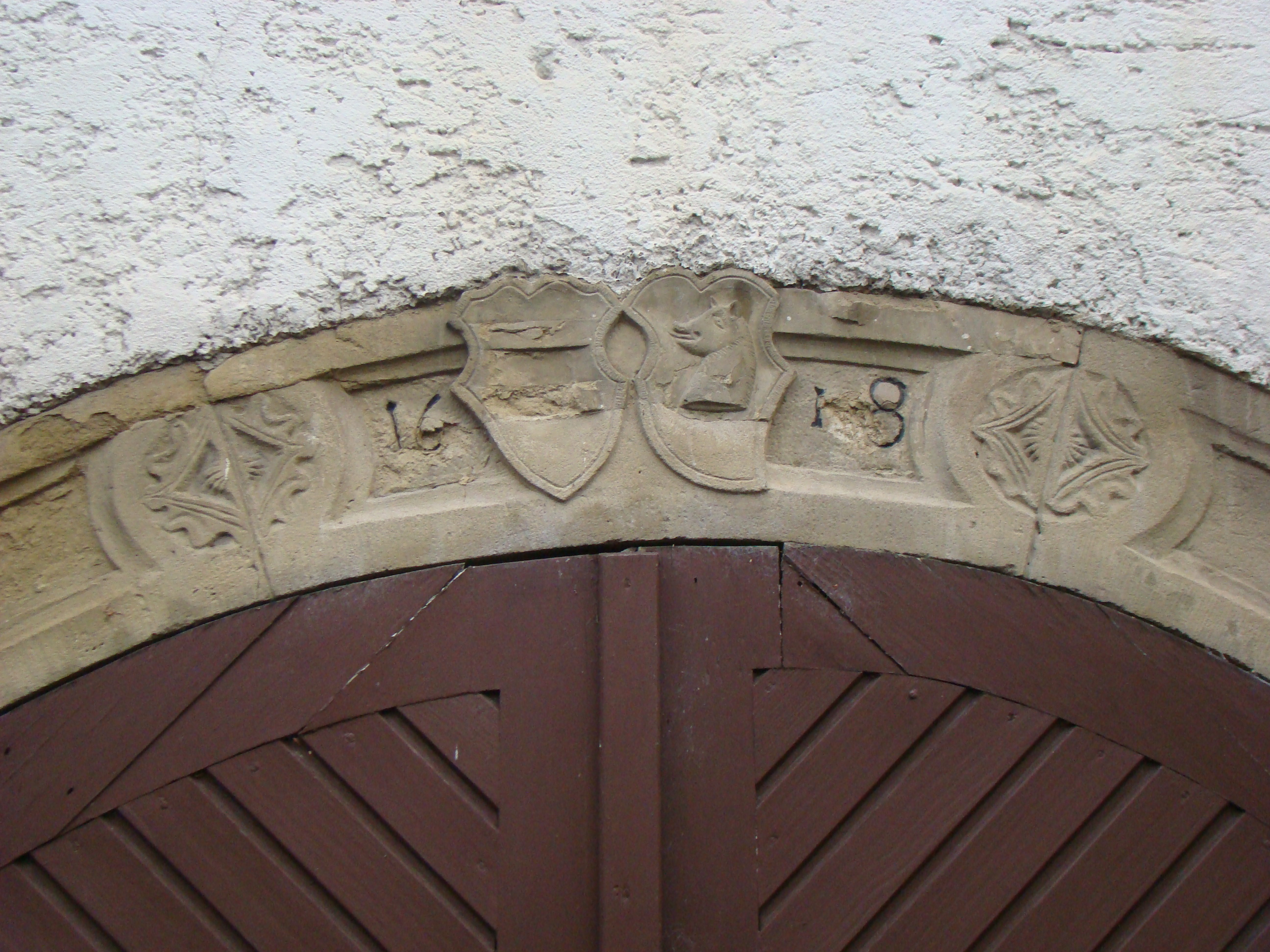 Wappenstein an der Kellertür vom Rentamt in Gemmingen